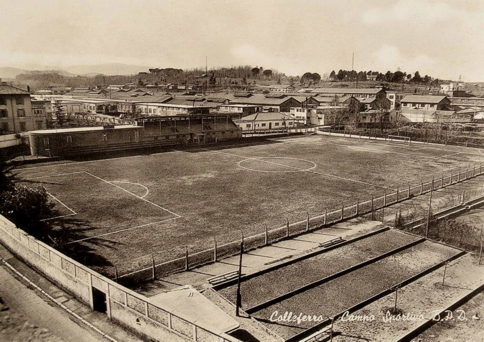 Cartolina stadio Maurizio Natali (Colleferro)